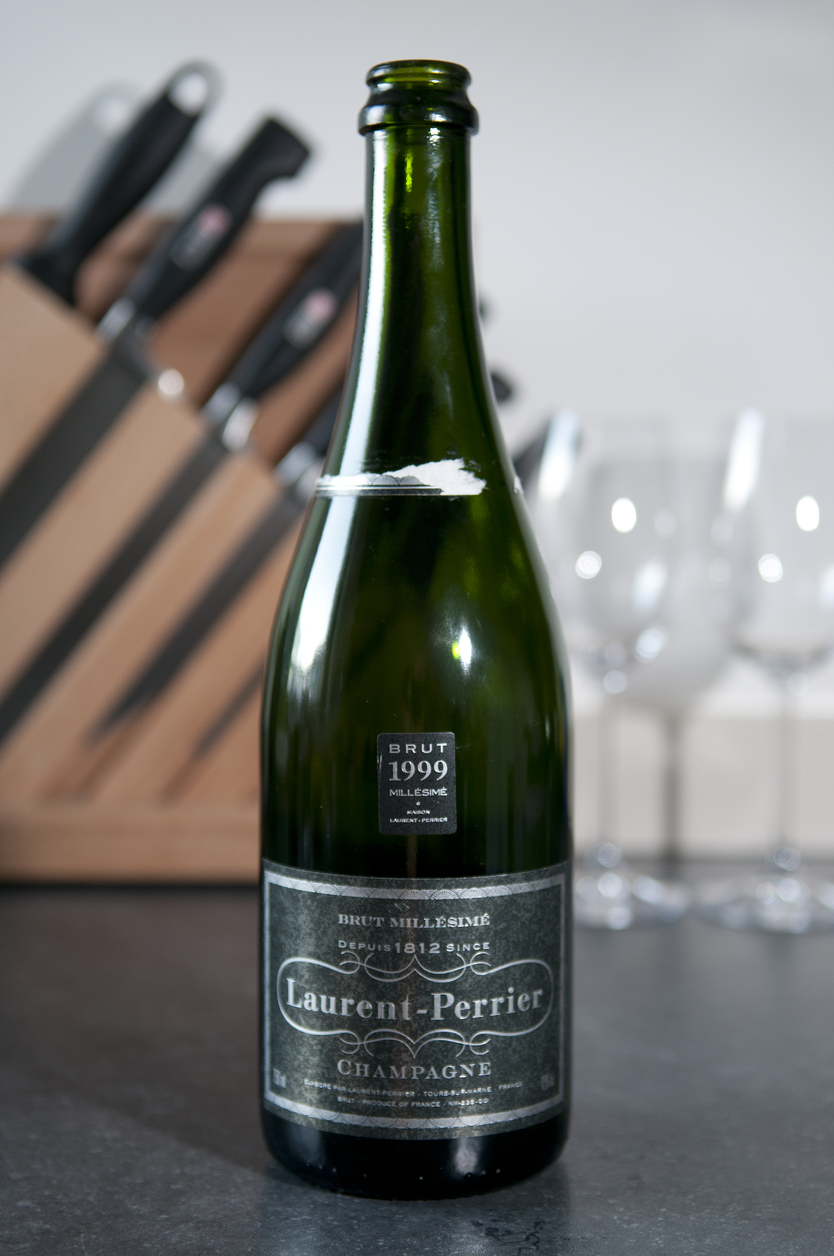 1999 Laurent-Perrier brut champagne